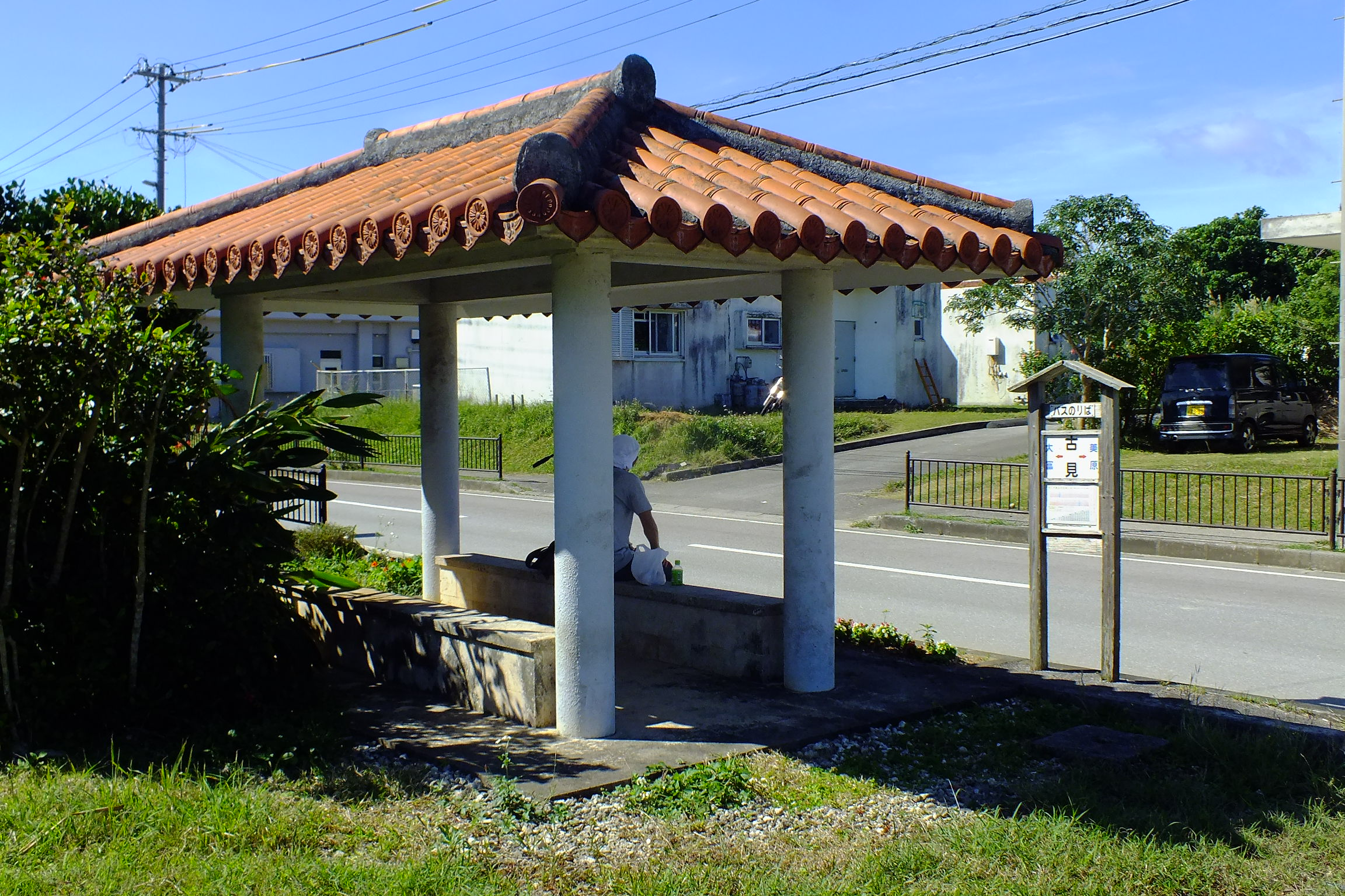 2017-01-29 Komi,Iriomoe-jima bus stop Iriomotejima Kōtsū 西表島古見バス停